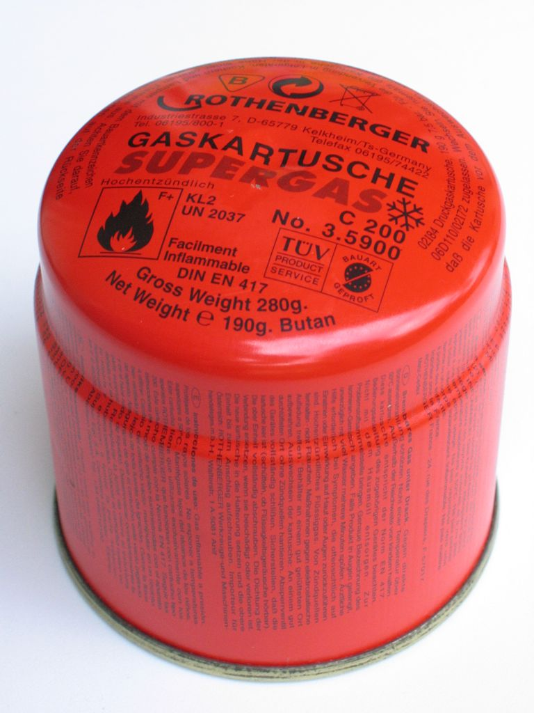 Einweg-Butangas-Kartusche, Füllmenge 190 Gramm unter Druck verflüssigtes Butangas